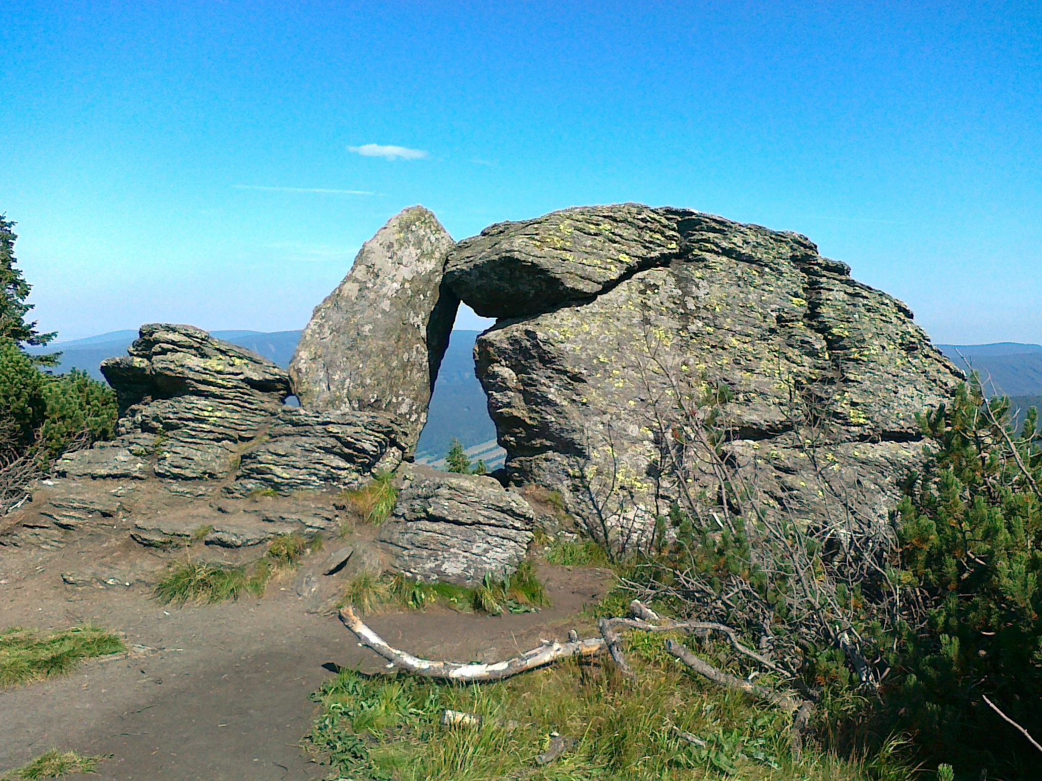 Formacja skalna o nazwie Kamenné okno na stoku Červená hora-S - 1310 m